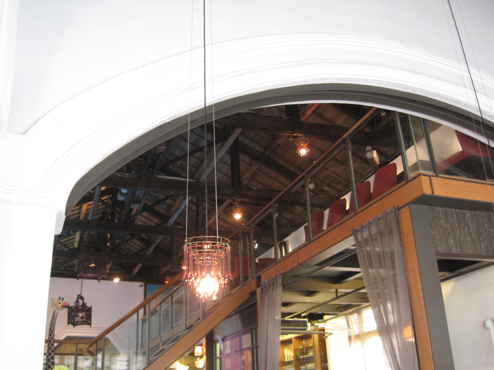 新化街役場內部